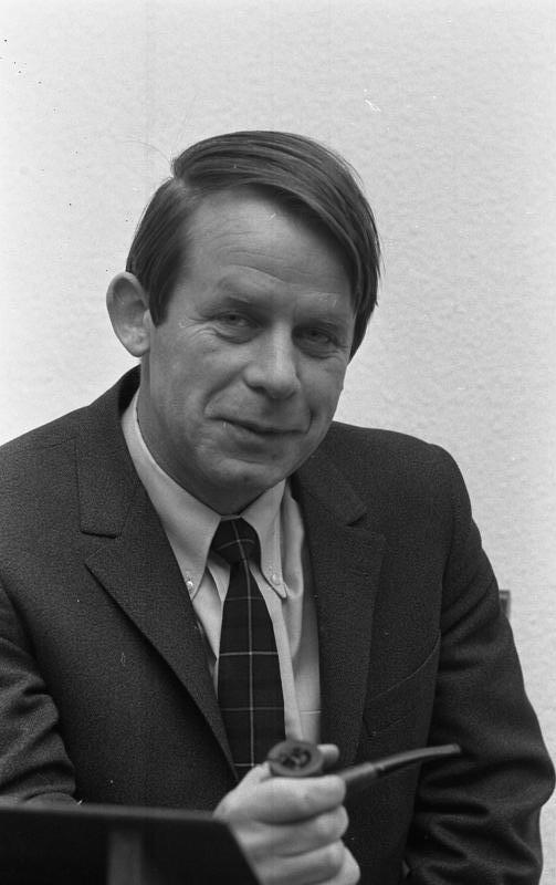 Dichterlesung Siegfried Lenz in der Landesvertr. Hamburg